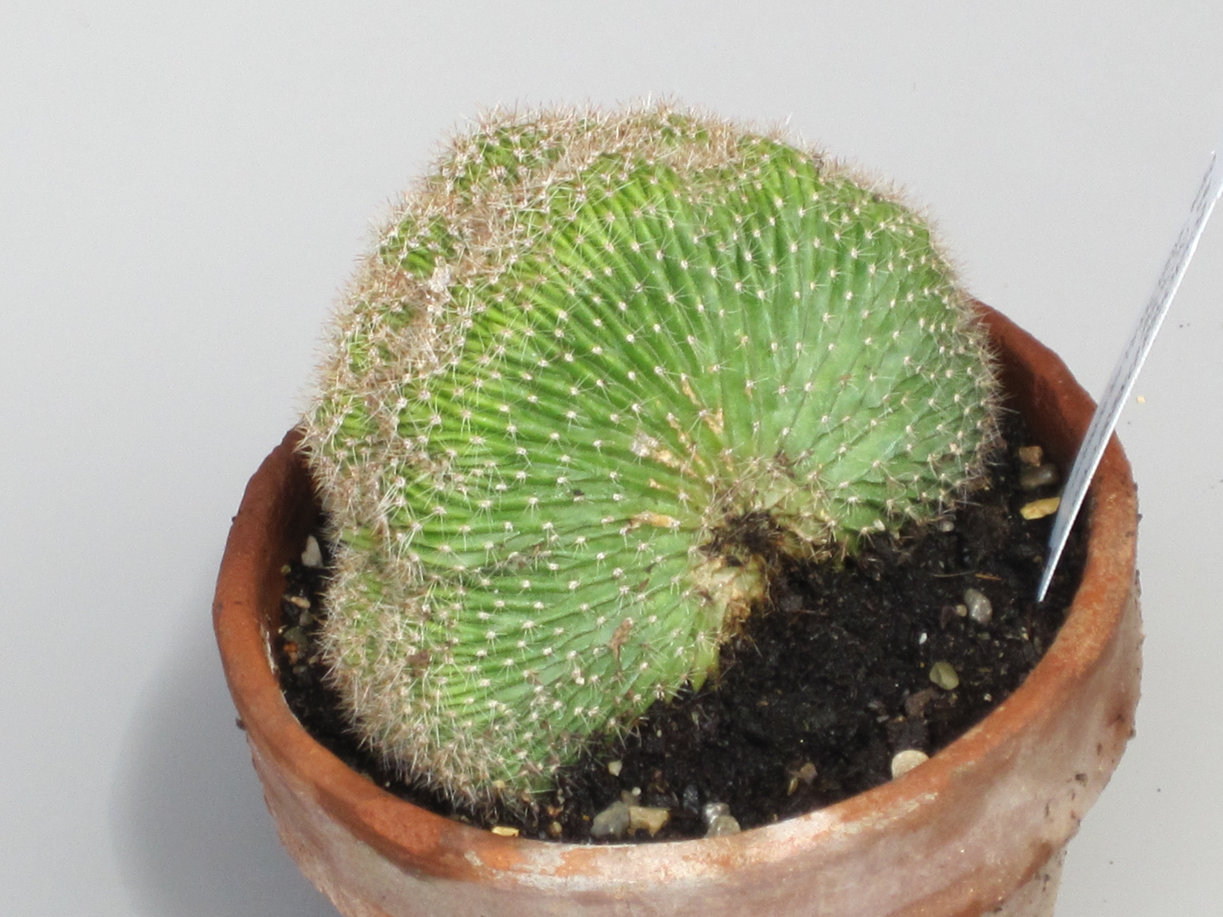 Esemplare di echinopsis oxygona crestato